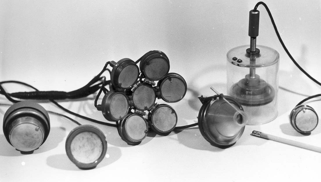 набор излучателей